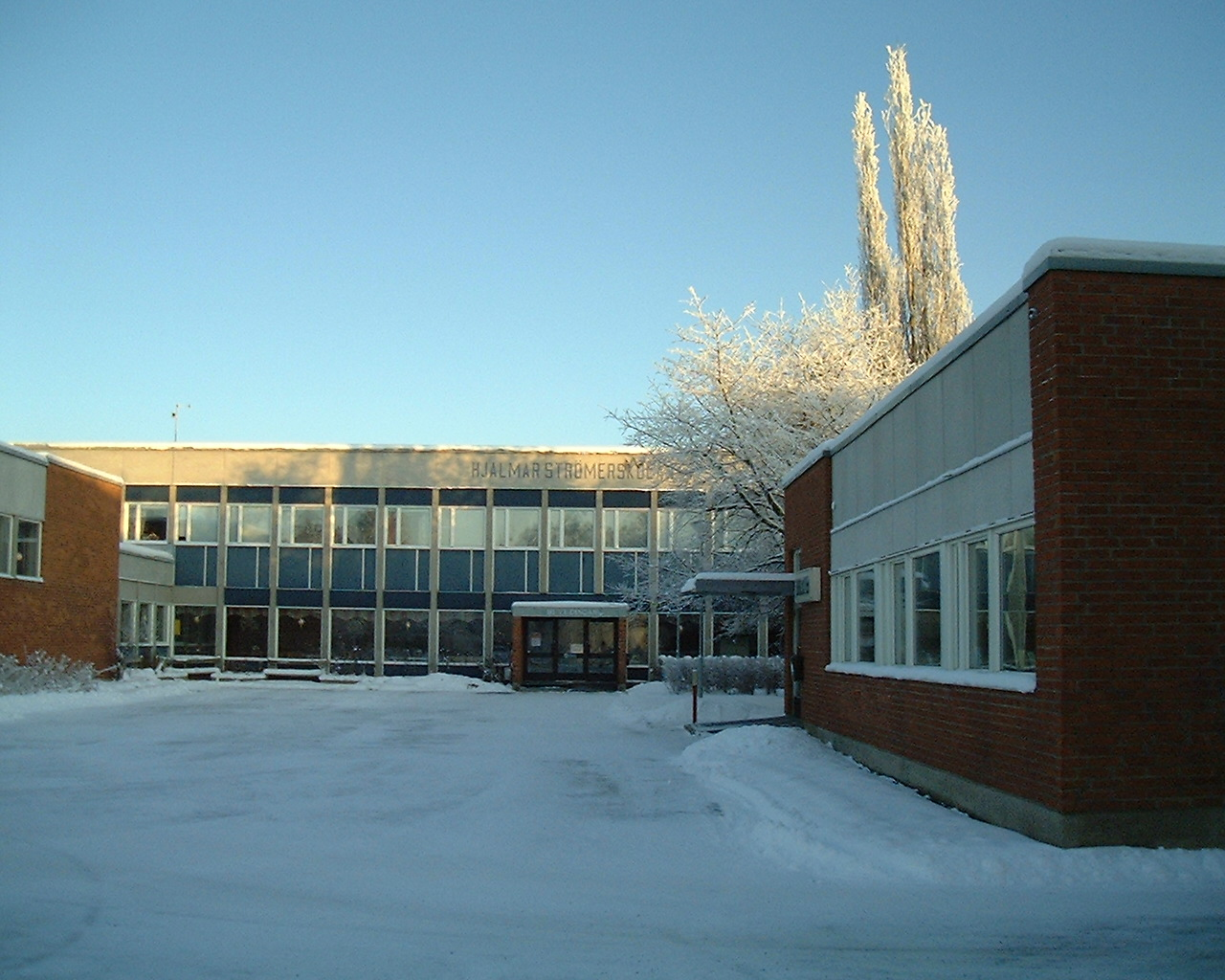 Hjalmar Strömerskolan, Strömsund, Jämtland